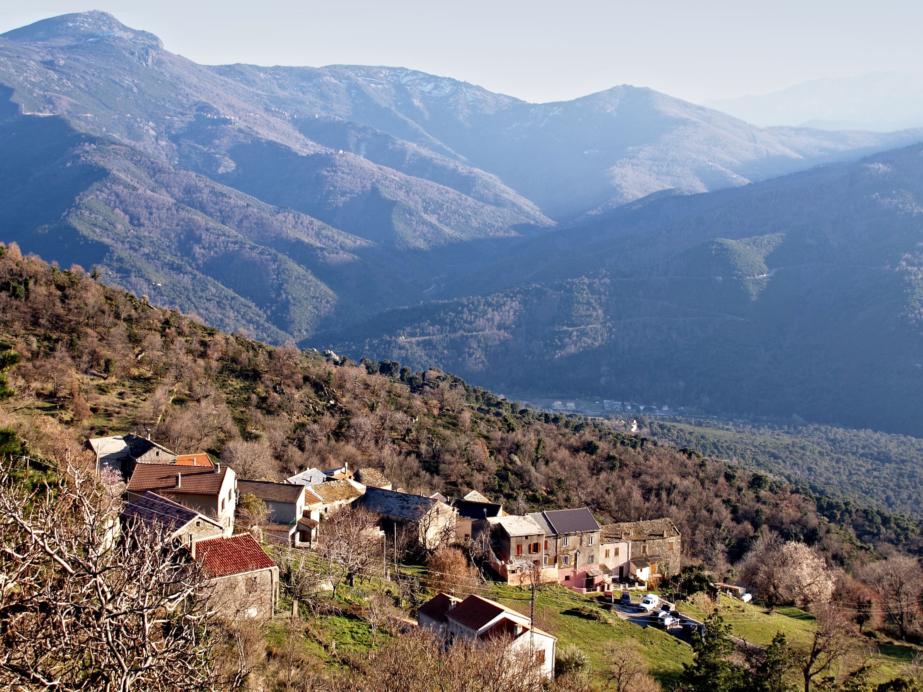 Scolca - Hameau d'Erbaggio et Monte Sant'Angelo